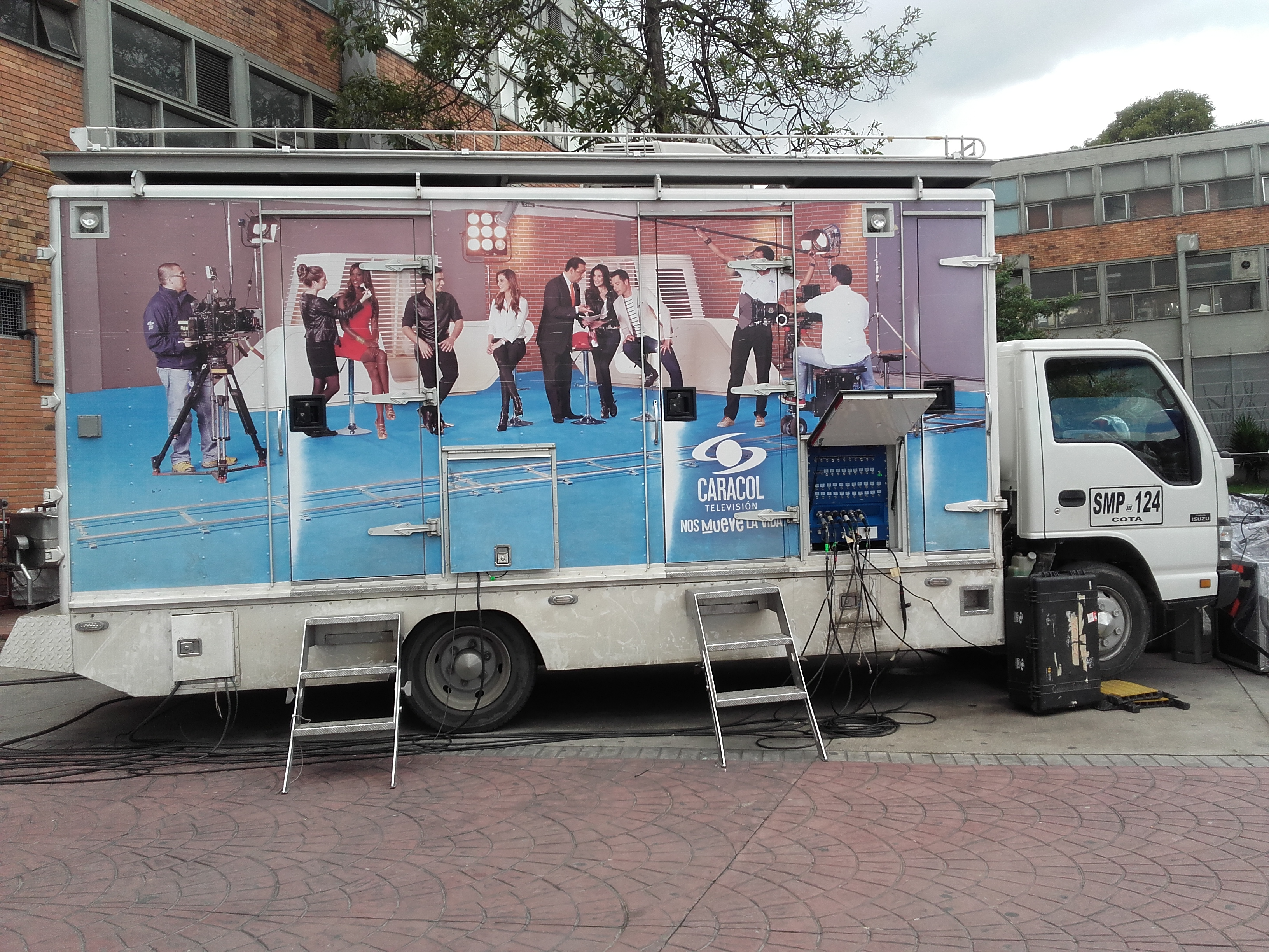 fnnfnfnffnkfkfkfkfkf